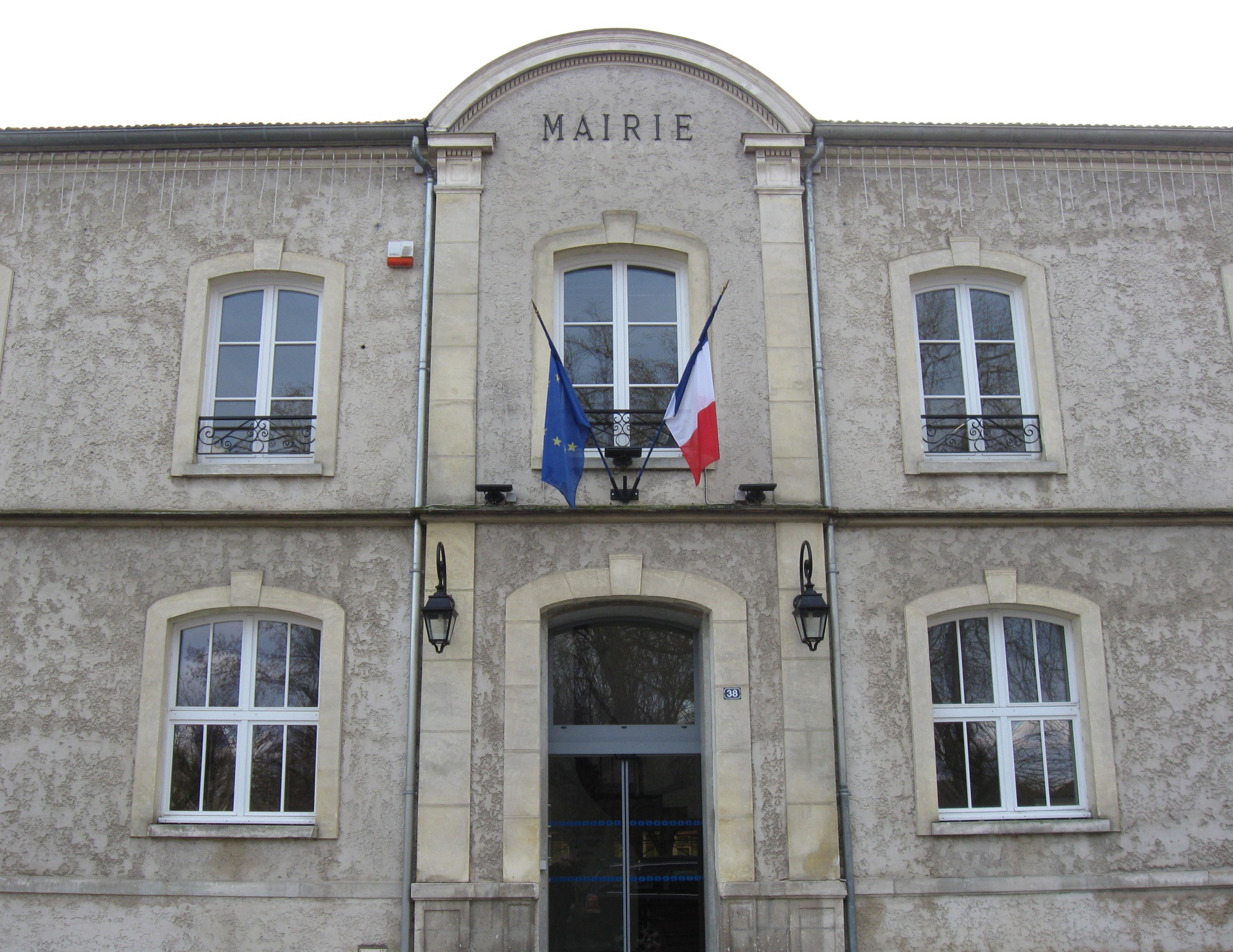 Mairie d'Annet-sur-Marne. (Seine-et-Marne, région Île-de-France).